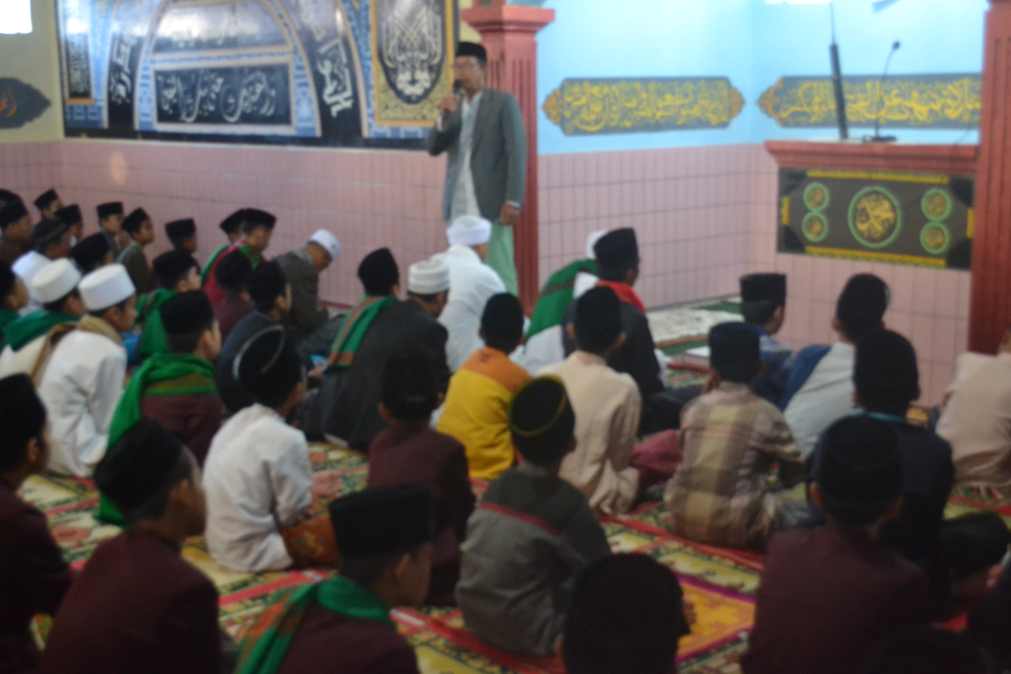 Tausiyah dari Pimpinan Pondok